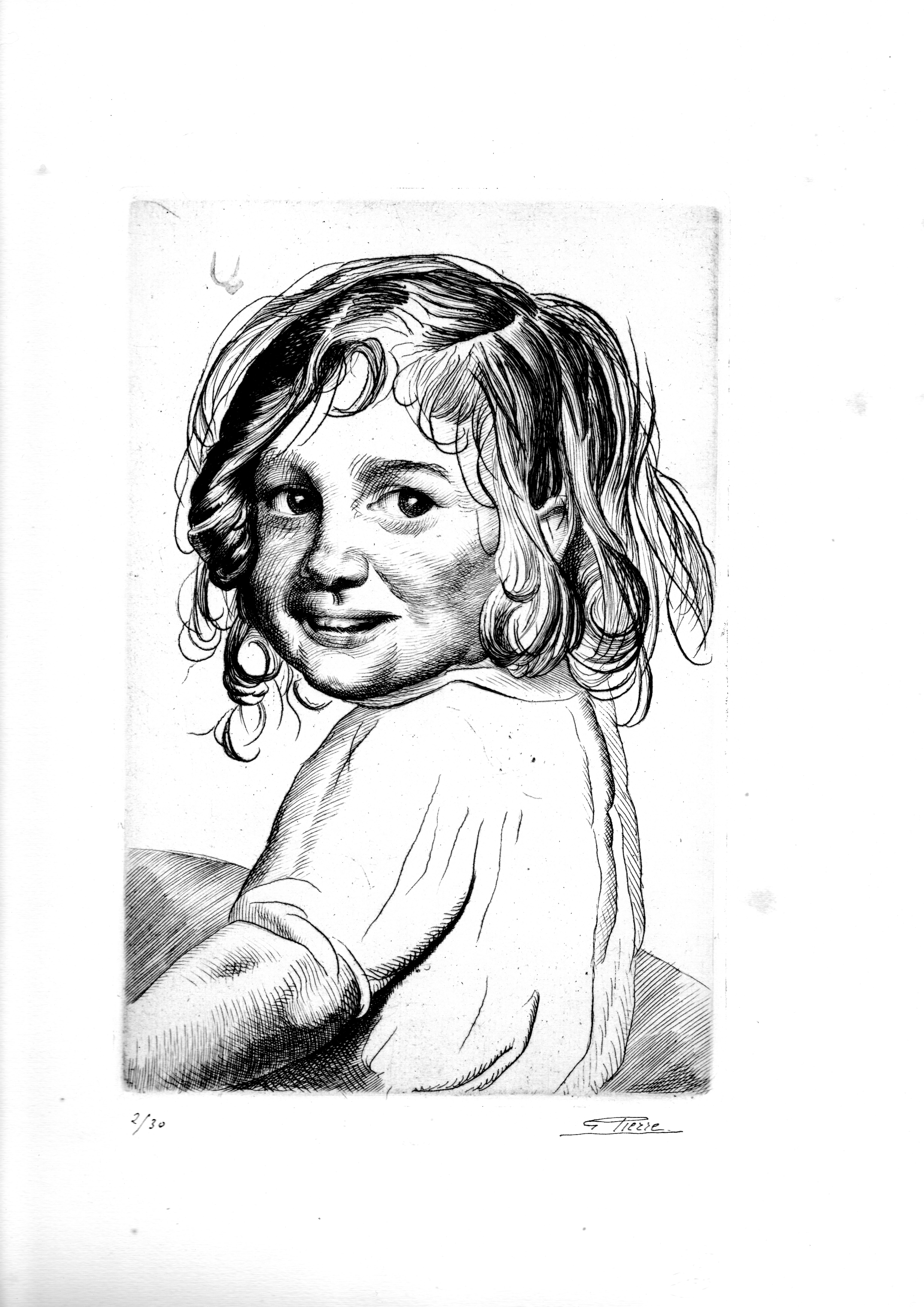 Eau Forte Portrait du fils de Gustave René Pierre , Guy Pierre.